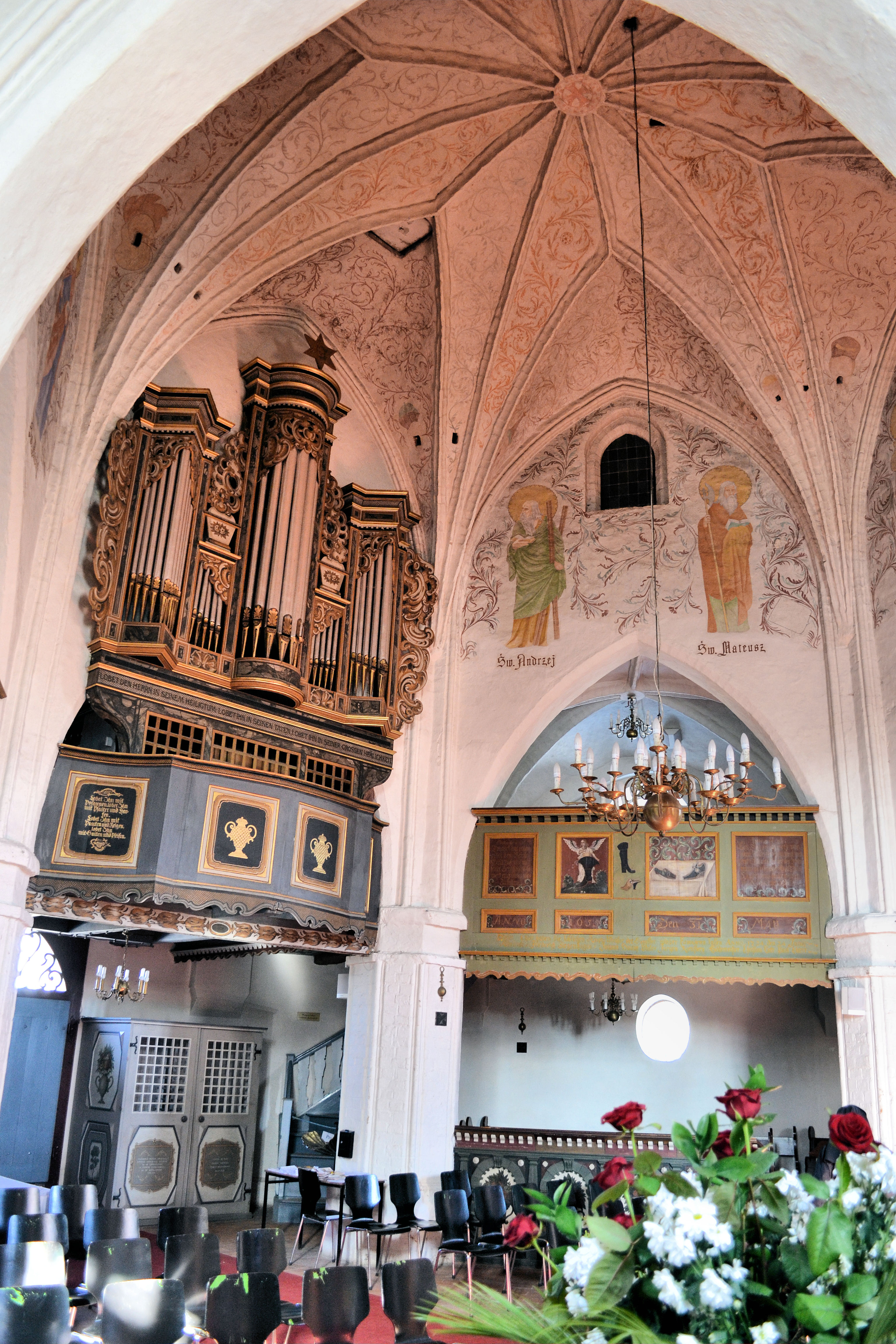 Kościół św. Gertrudy w Darłowie